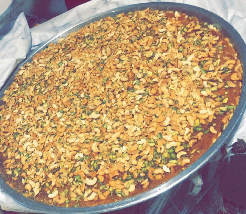 صورة لكنافة نفيسة الأردنية